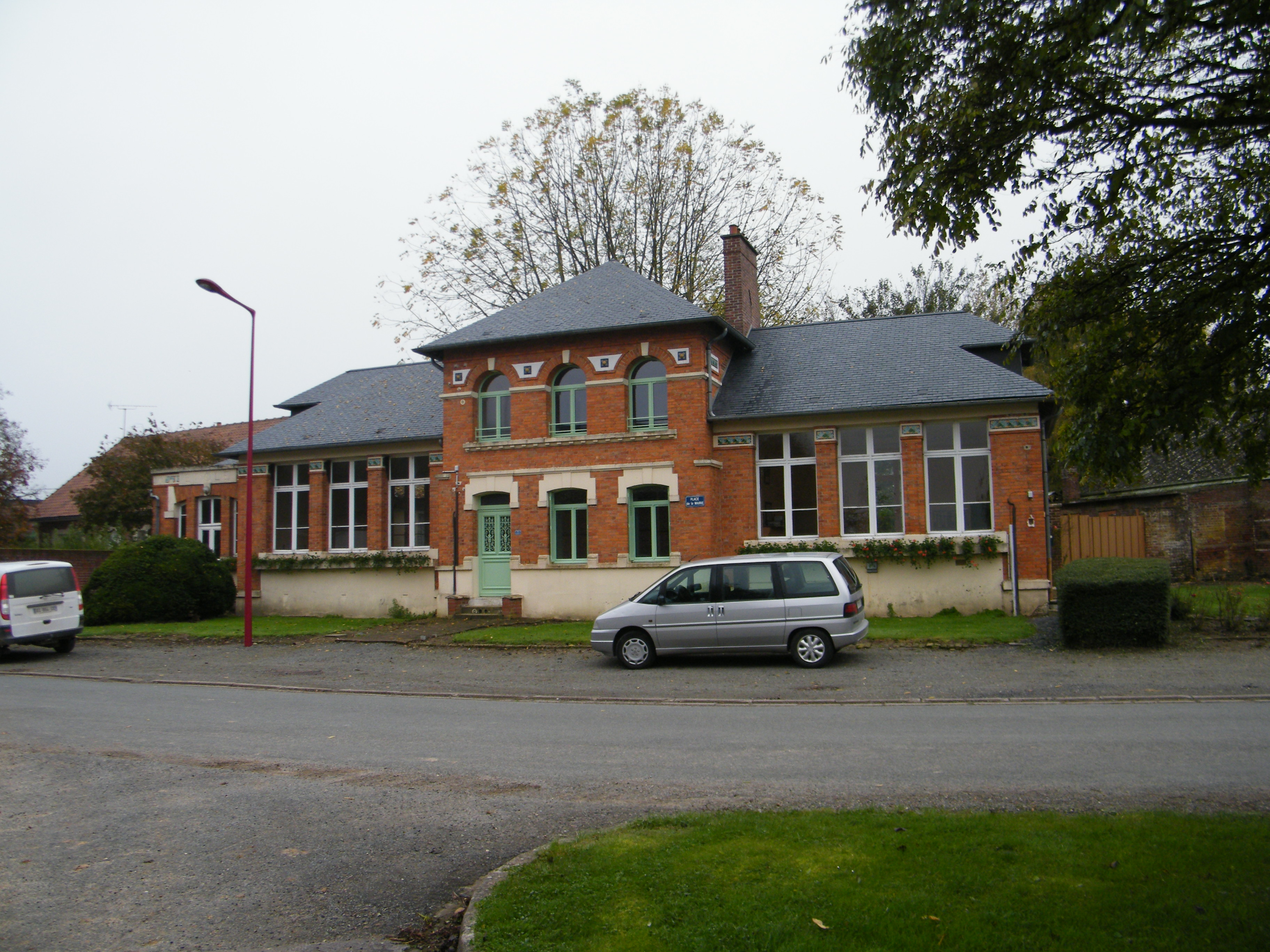 Bâtiments communaux.